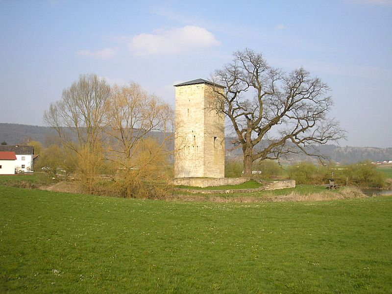 Wasserburg Rieshofen (Gemeinde Walting, Landkreis Eichstätt, Oberbayern). Gesamtansicht. Eigene Aufnahme, April 2007 / Water castle Rieshofen near Eichstaett, Upper Bavaria, Germany). Total view. Own photo, April 2007